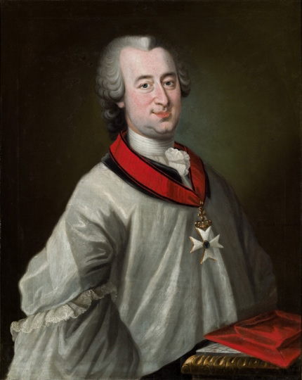 Ernst Ludwig Christoph Freiherr von Spiegel zum Desenberg, mit dem den Halberstädter Domherrn gestifteten preussischen St. Stephansorden (lt. ADB ein in acht Spitzen ausgehendes Kreuz, in dessen Mitte sich auf der einen Seite das Bild Sancti Stephani als Patrons des Halberstädter Domes und auf der andern der goldgekrönte schwarze Adler mit ausgebreiteten Flügeln und einem goldenen Namenszuge befand